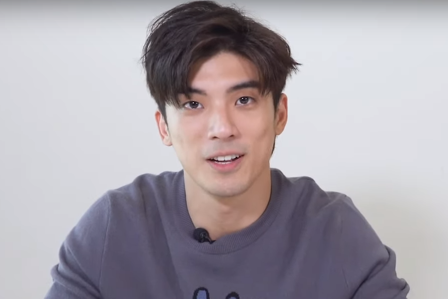 ELLE TV 一心二用大挑戰(畫畫&快問快答)